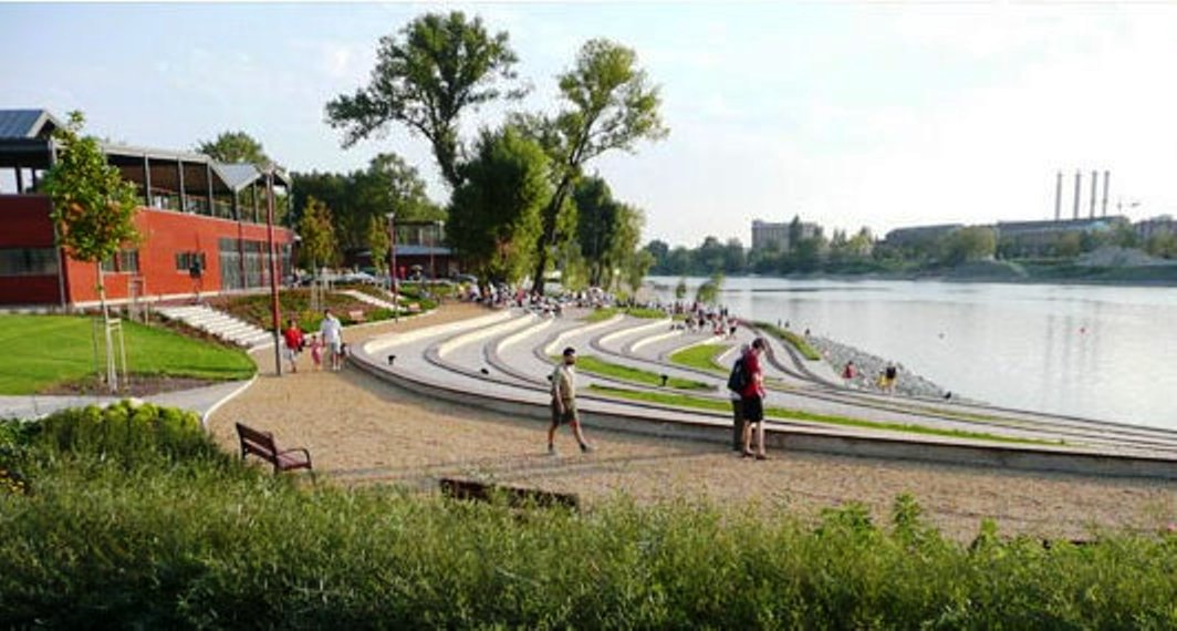 A Lágymányosi-öböl képe